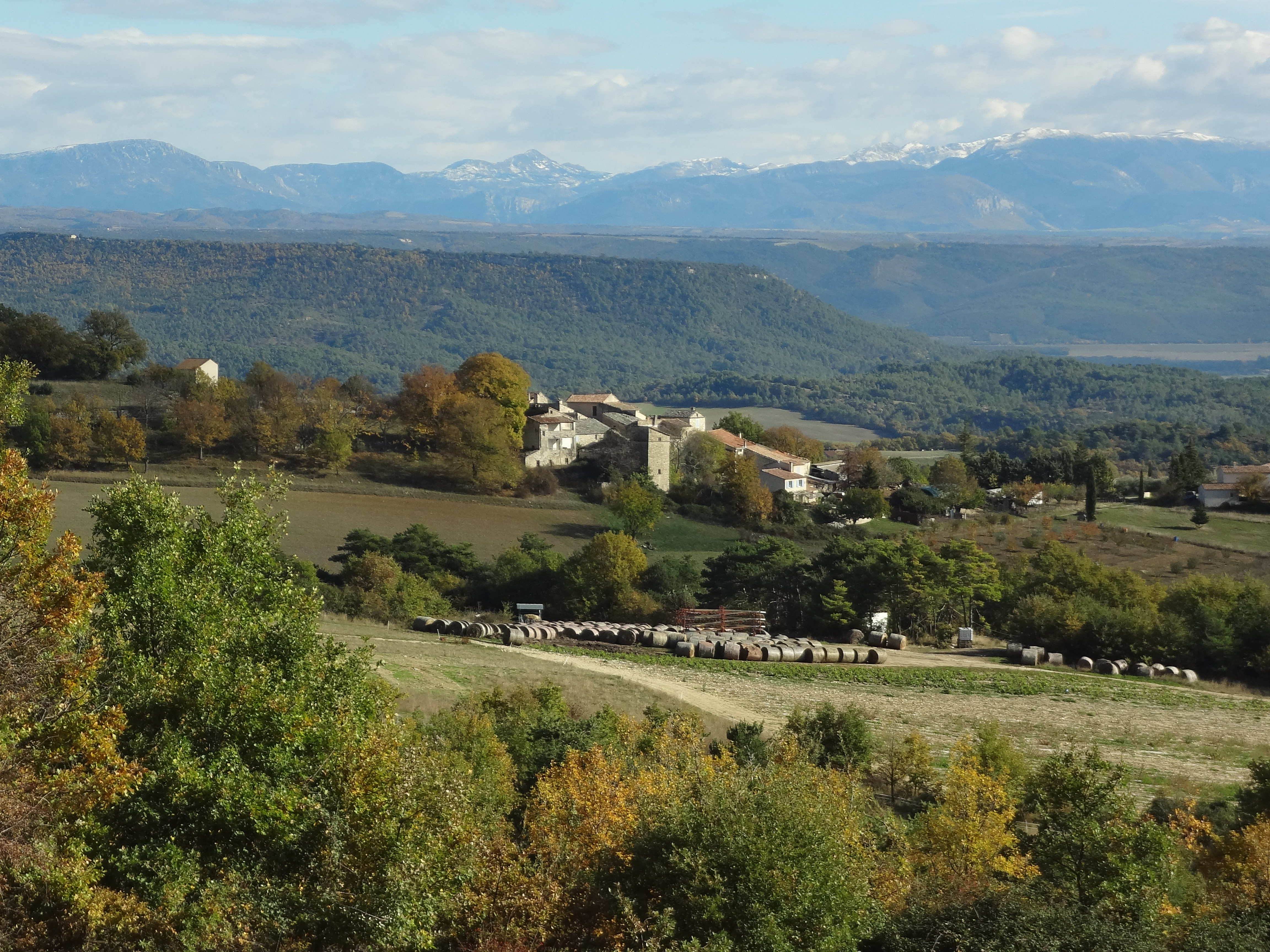 Hameau de Saint-Martin (Revest-Saint-Martin)